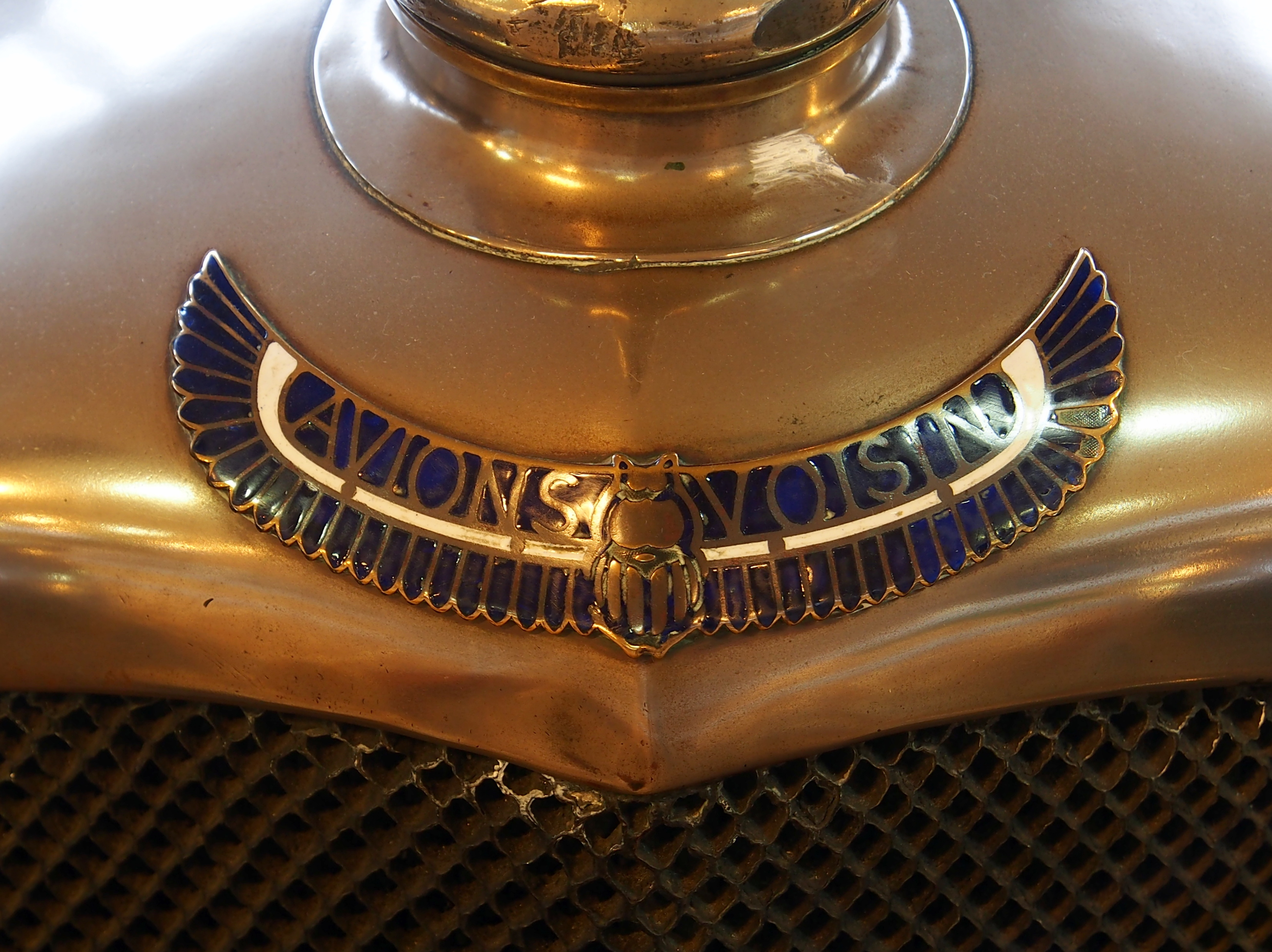 Photographed at the Musée Automobile de Vendée, France.